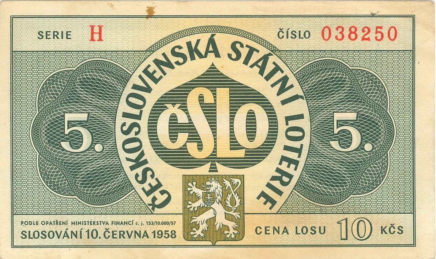 vývoj losů ČSLO